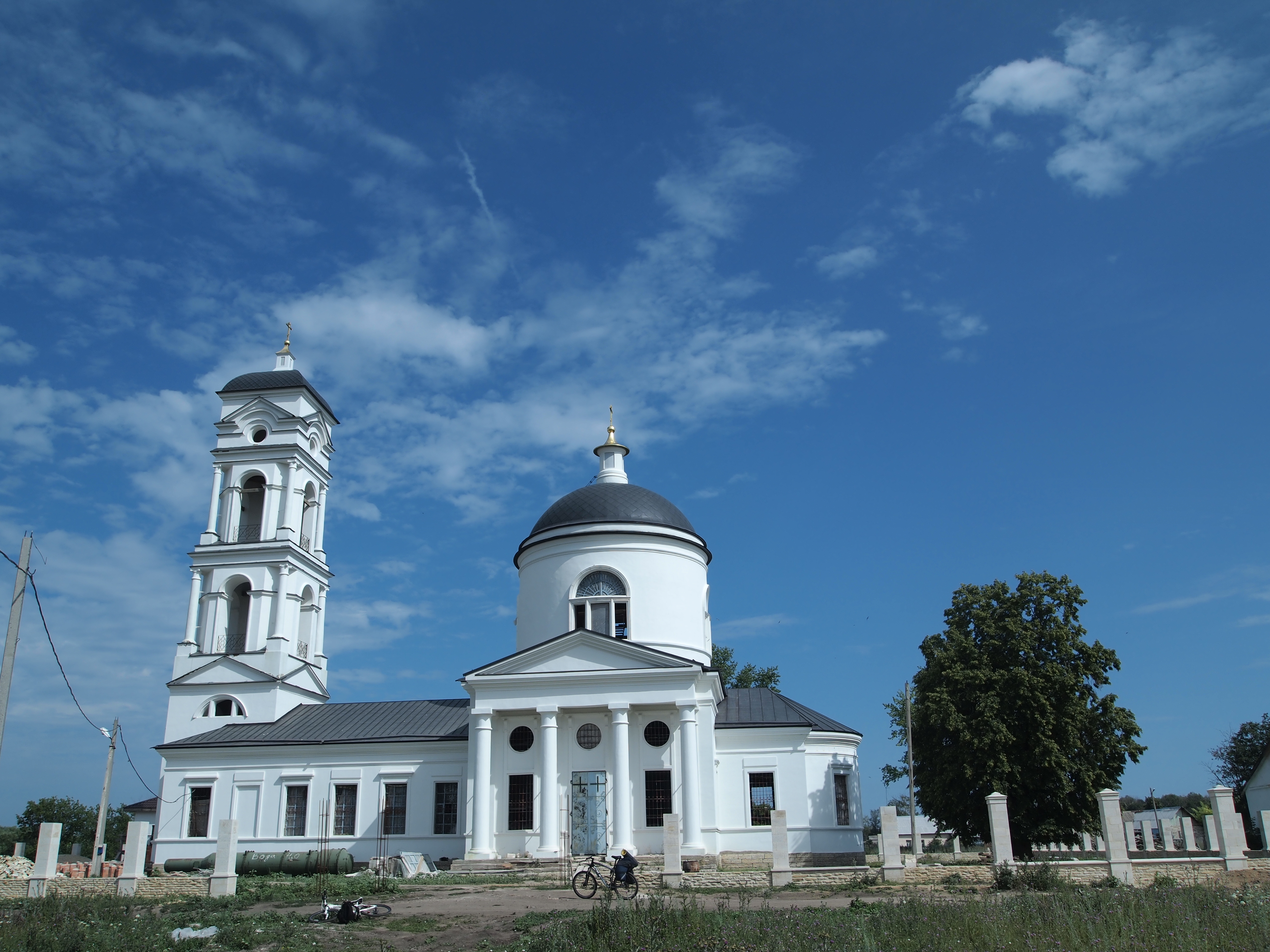 Церковь Михаила Архангела (Липецкая область, Задонск, село Скорняково)